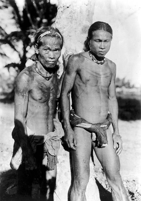 Repronegatif. Penduduk Siberut, Kepulauan Mentawai